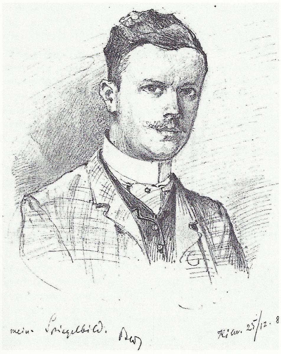 Bernhard Below, Selbstportrait